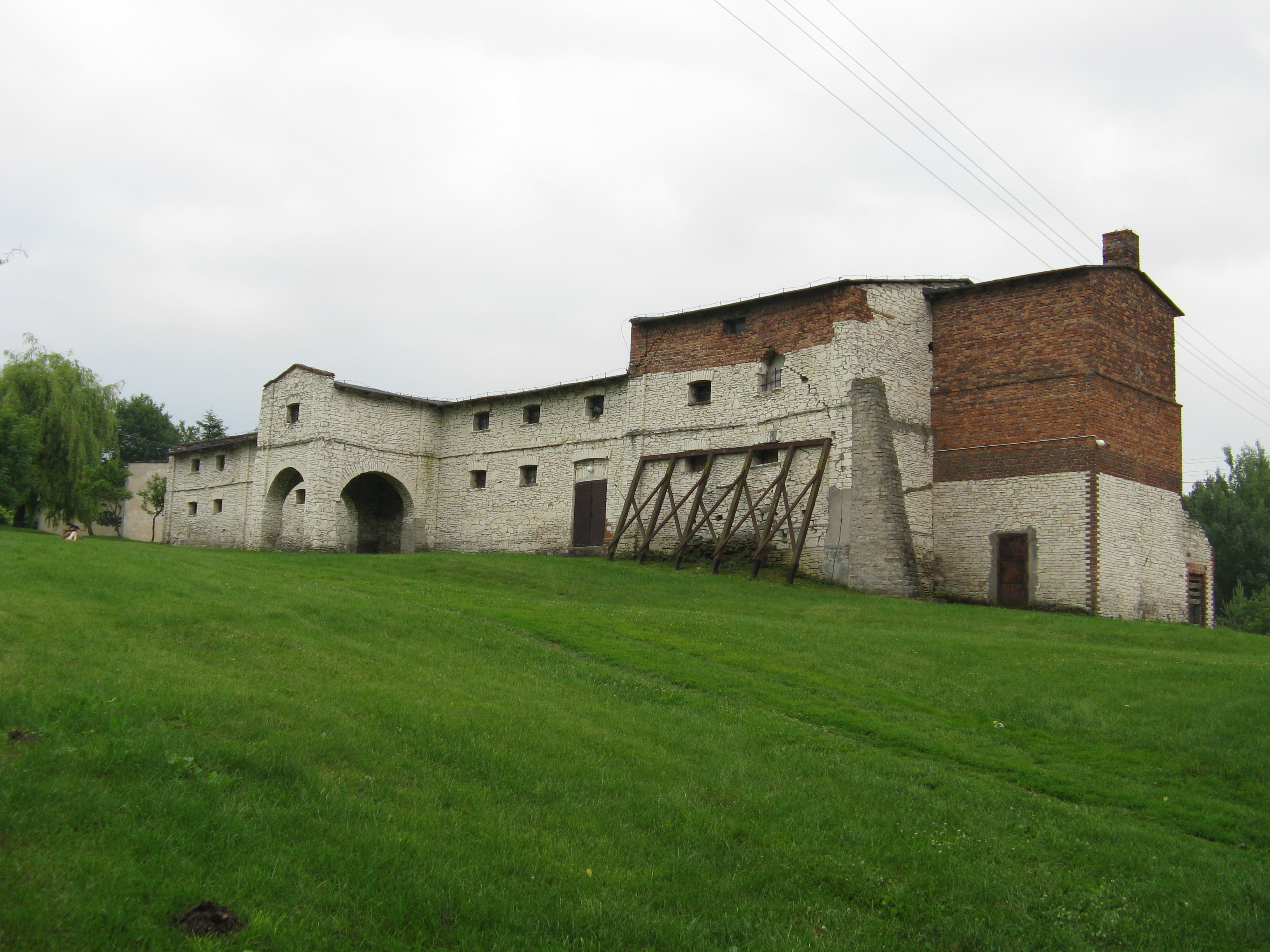 Spichlerz w Gardzienicach, w którym mieszczą się wystawy związane z historią teatru